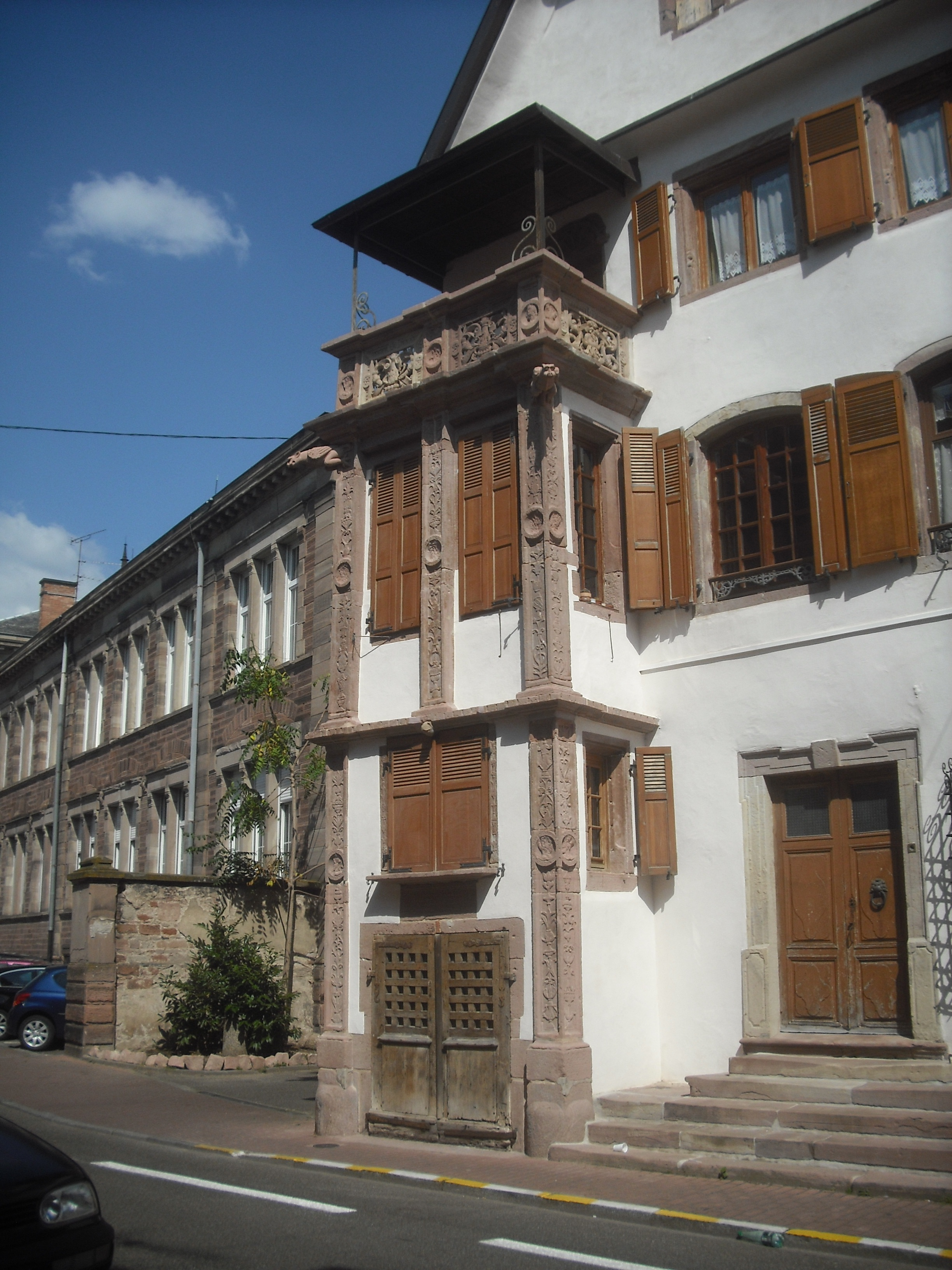 Maison Ziegler, Sélestat, Bas-Rhin, France.